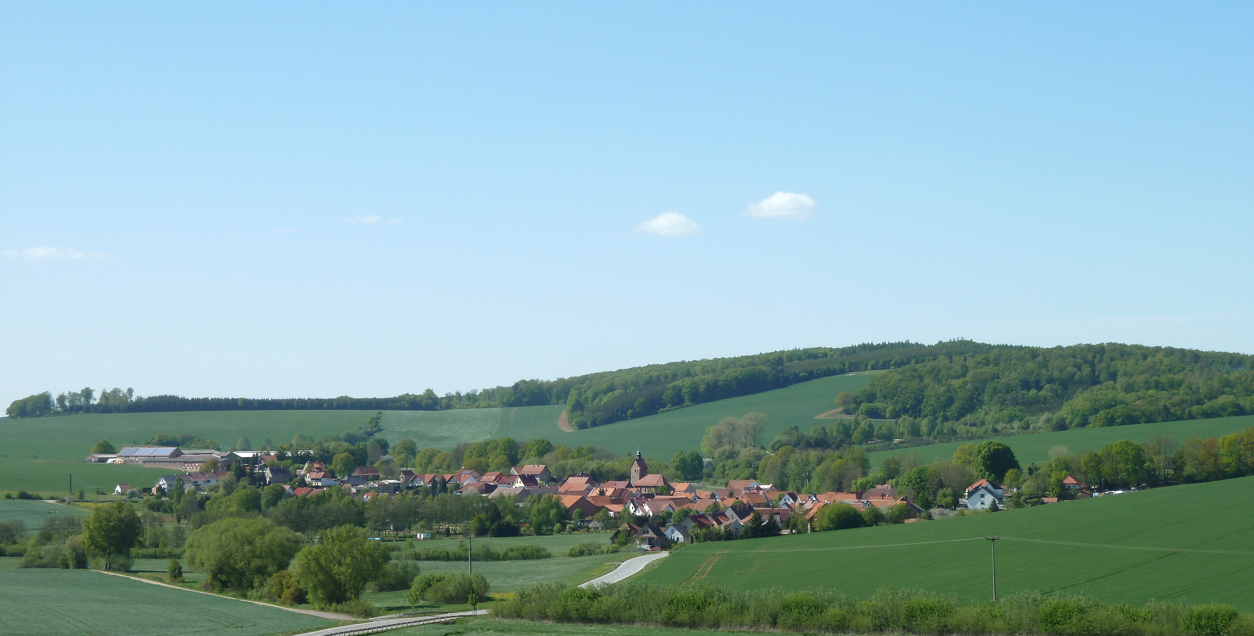 Blick von Südosten auf Mengelrode, Landkreis Eichsfeld. Hinten der Rumsberg